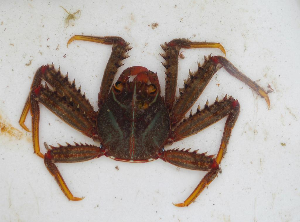 Percnon planissimum ：トゲアシガニ 2015/06/07 和歌山県田辺市：Tanabe City. Wakayama Pref. Japan